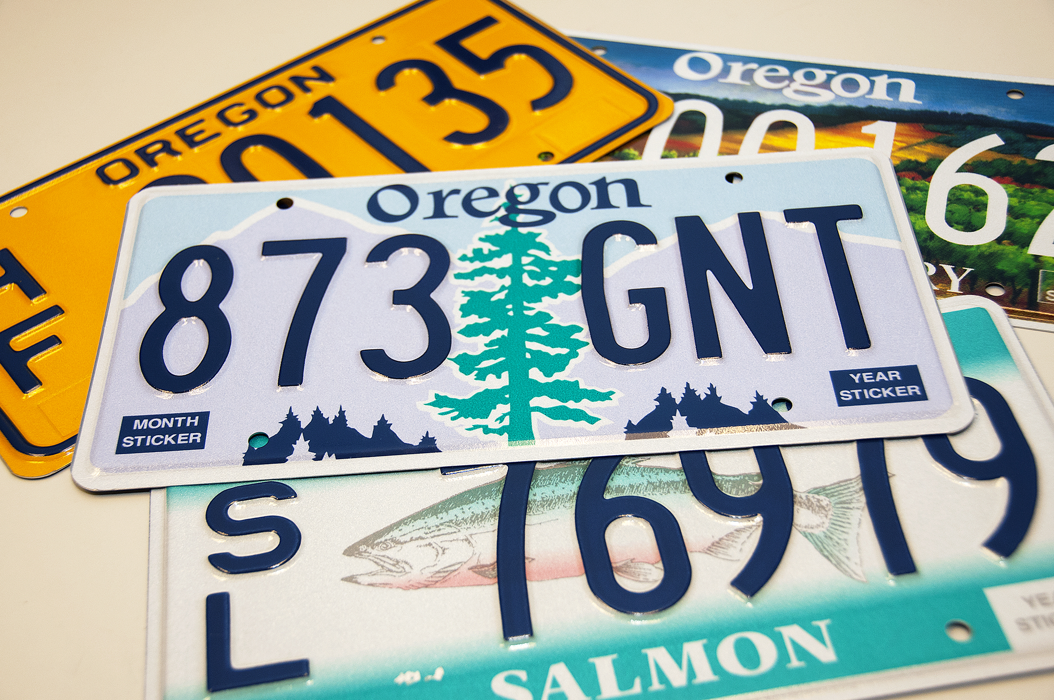 Oregon license plate styles